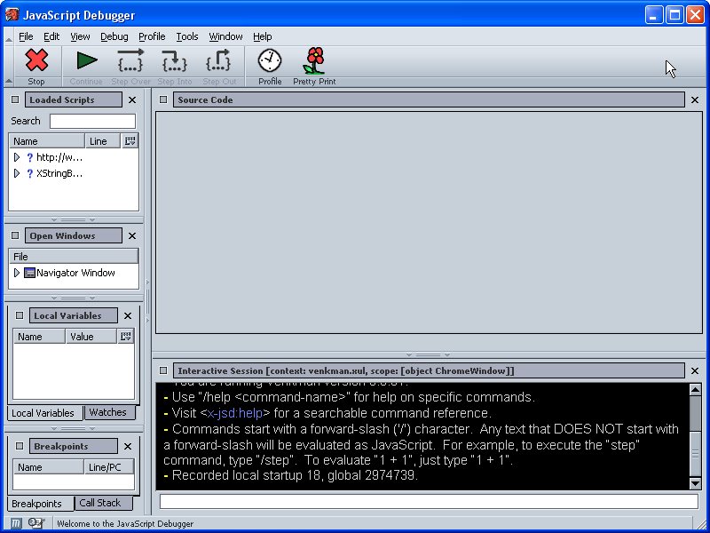 Der JavaScript-Debugger Venkman unter Mozilla